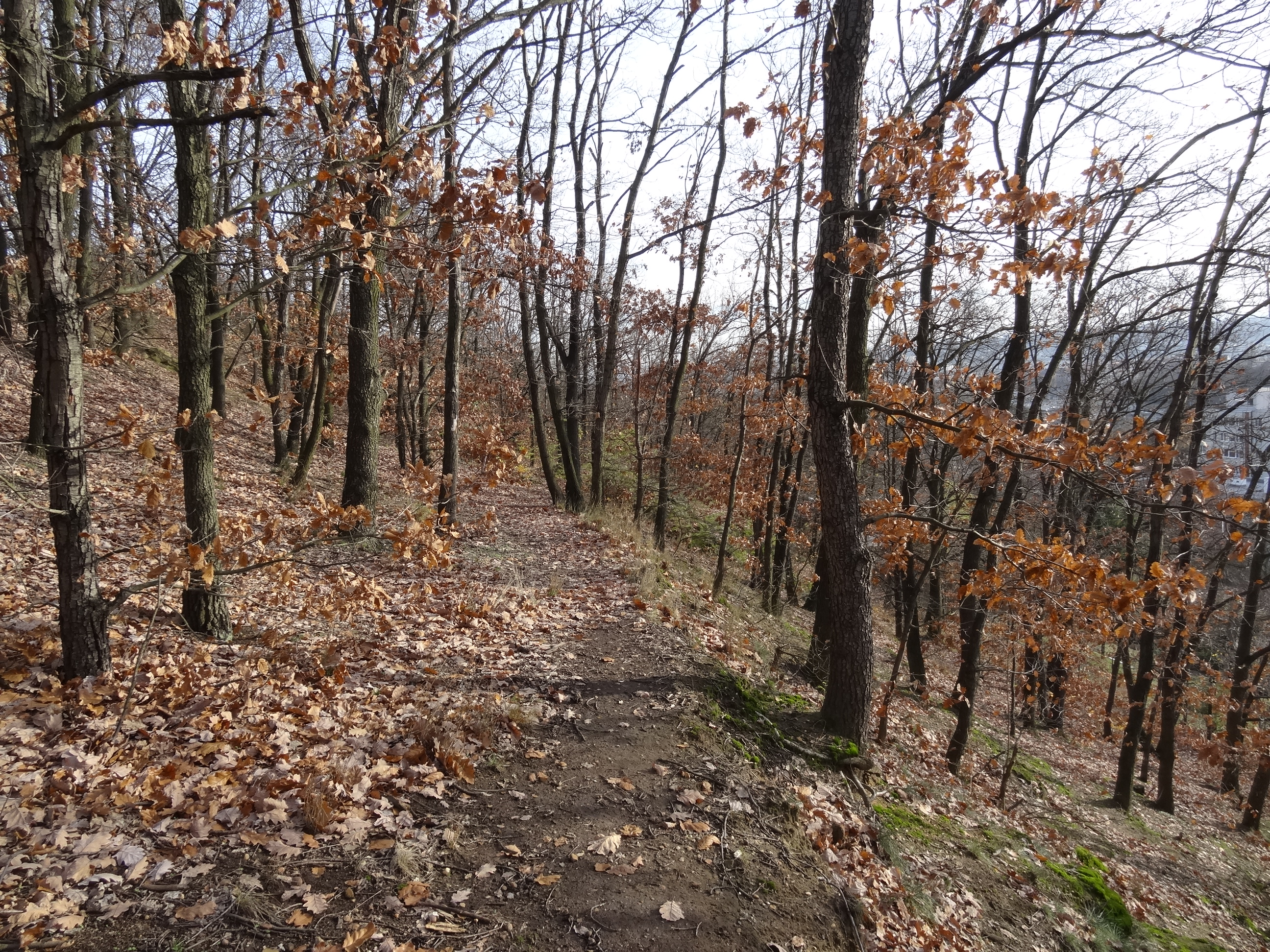 PP Okrouhlík - střední část chráněného území